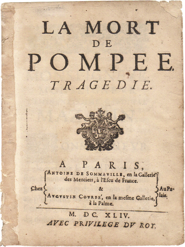 Corneille La mort de Pompée Paris Sommaville Courbé 1644